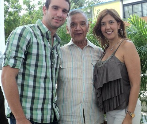 El ns aproximadamente.